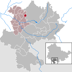 Ahlstädt in Thuringia - district Hildburghausen